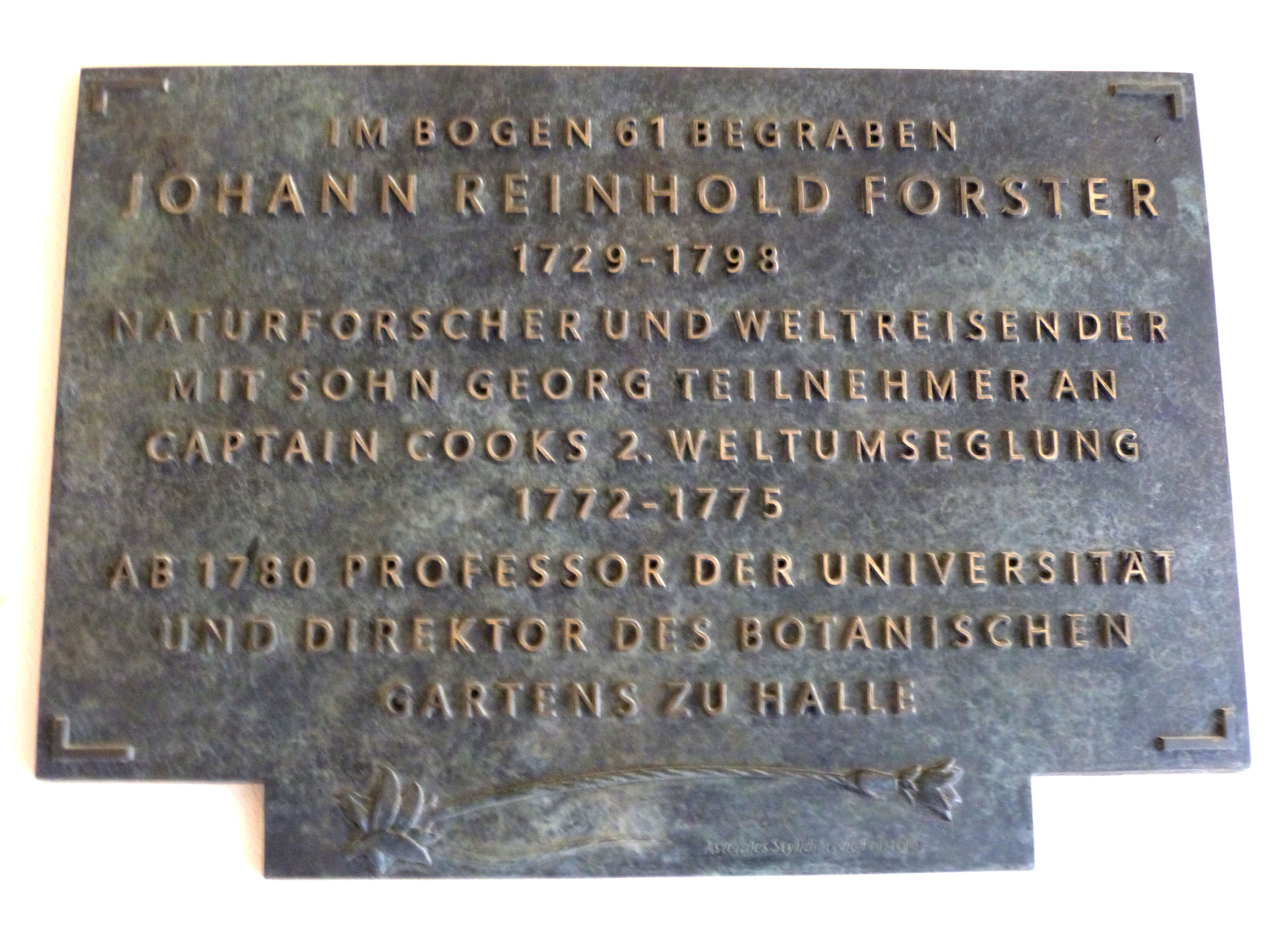 Gedenktafel für Johann Reinhold Forster im Grabbogen 61, Stadtgottesacker Halle, Bildhauer Martin Roedel 2016